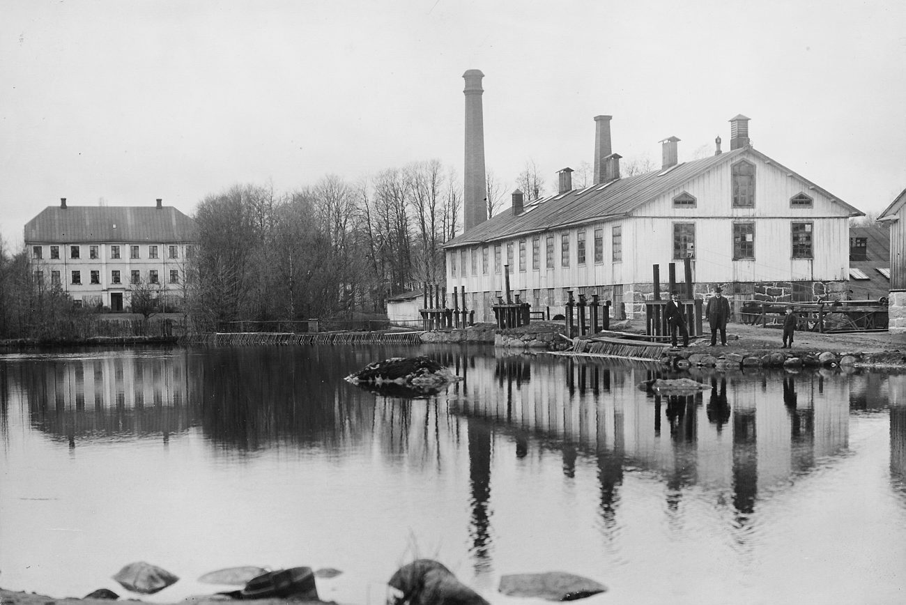 DIG1702. Gransholms herrgård och pappersbruk. Fotografiet är skänkt till Tekniska museet från Svenska Turistföreningen.